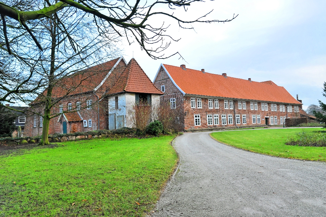 Neuenwalde 2012